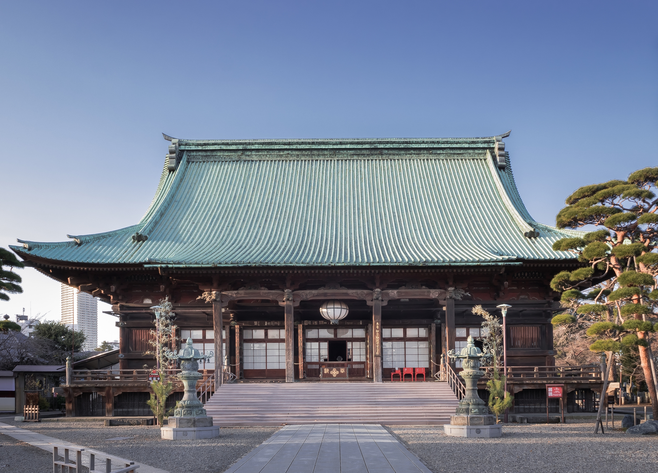 護国寺 - 本堂（重要文化財）